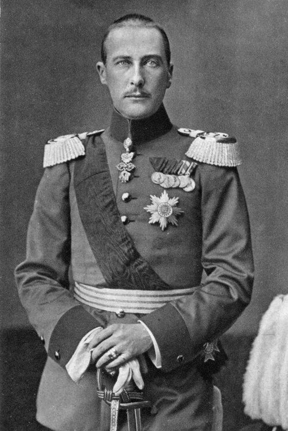 Albrecht, Duke of Württemberg or Albrecht Herzog von Württemberg (Albrecht Maria Alexander Philipp Joseph von Württemberg, 23 December 1865 – 31 October 1939)